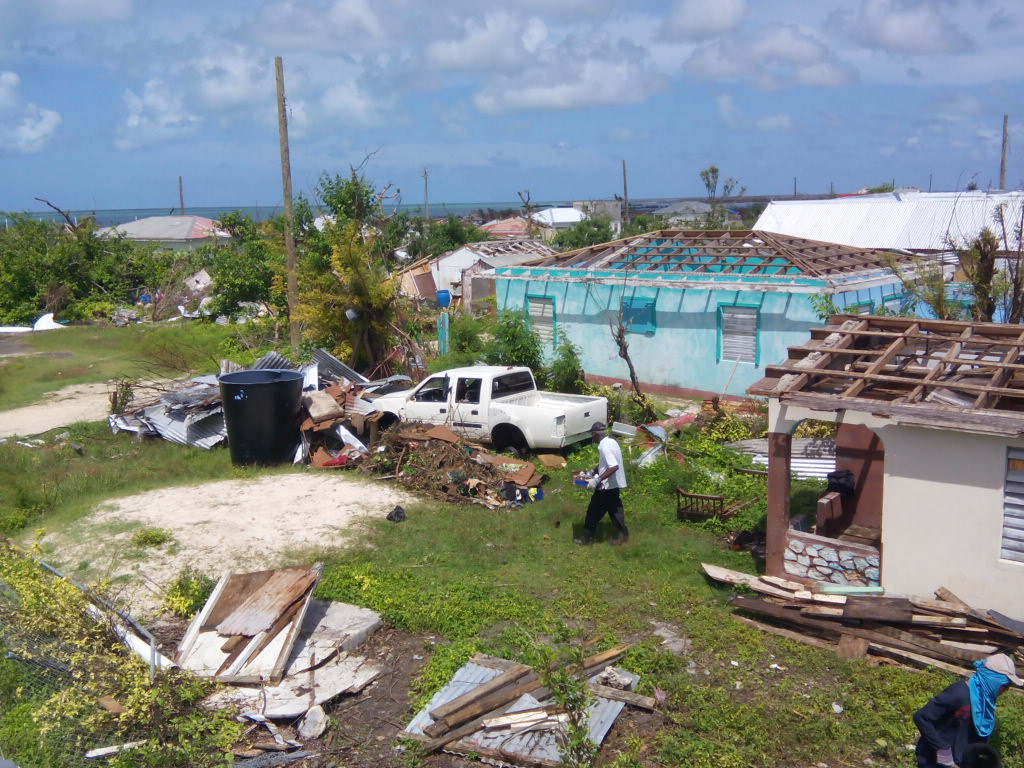 Badai Irma yang melanda Barbuda menghancurkan 95% dari infrastruktur yang ada